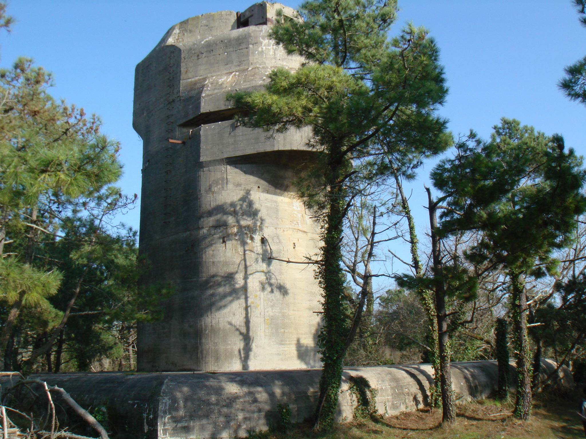 Postes de direction de tir type S497 (Kora-Karola, près de La Rochelle?)